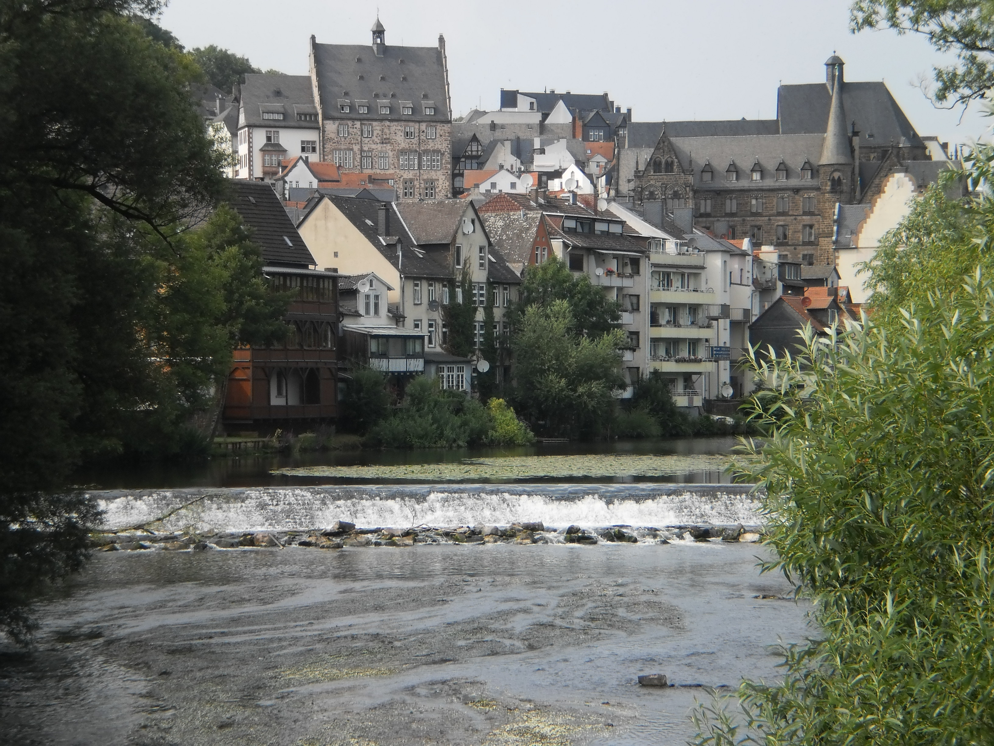 Old town of Marburg with town hall (up in the left). Nearly at the river Lahn you can see the buildings of old University in the right. This photo is taken in the summer of 2016 from Hirsefeldsteg, a bridge for walkers and cyclists in the South of that historic town in the middle of Germany. ↓More Photos↓